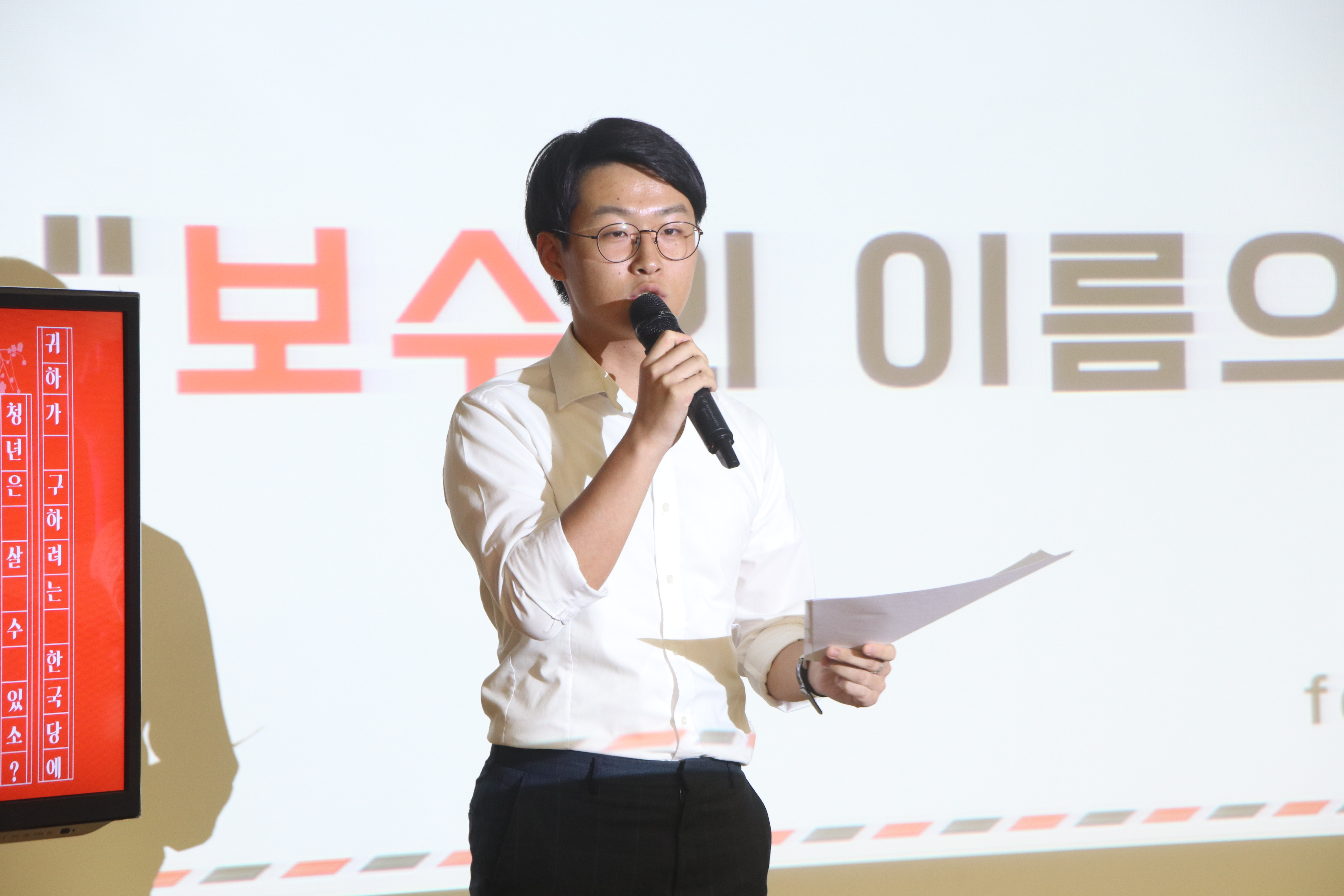 신보라 국회의원 주최 세미나에서 '최민창 청년특위 위원'이 발표하는 사진